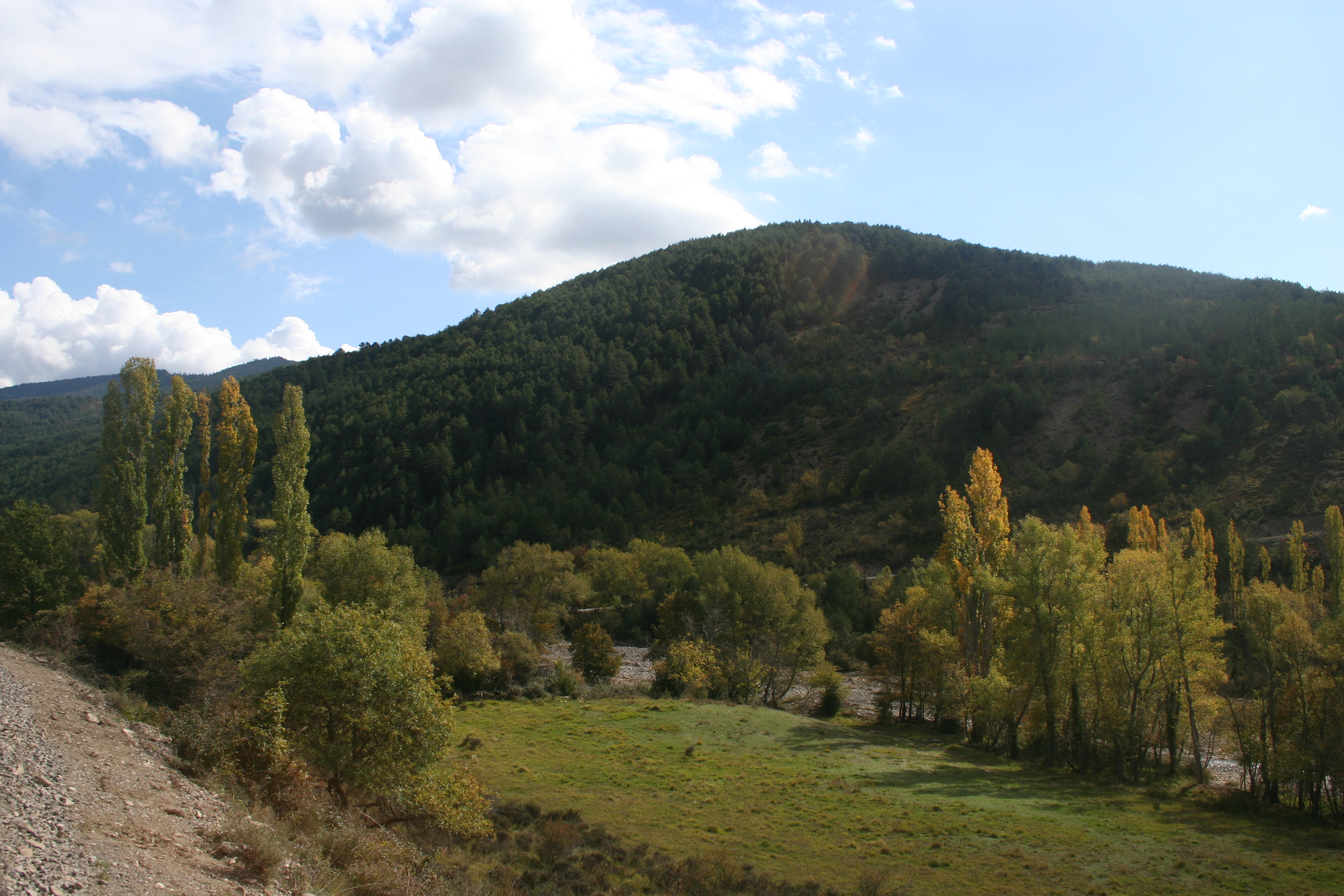 Valle de la Garcipollera This is a photography of a Site of Community Importance in Spain with the ID: ES2410014. Natura2000 entry, EEA entry